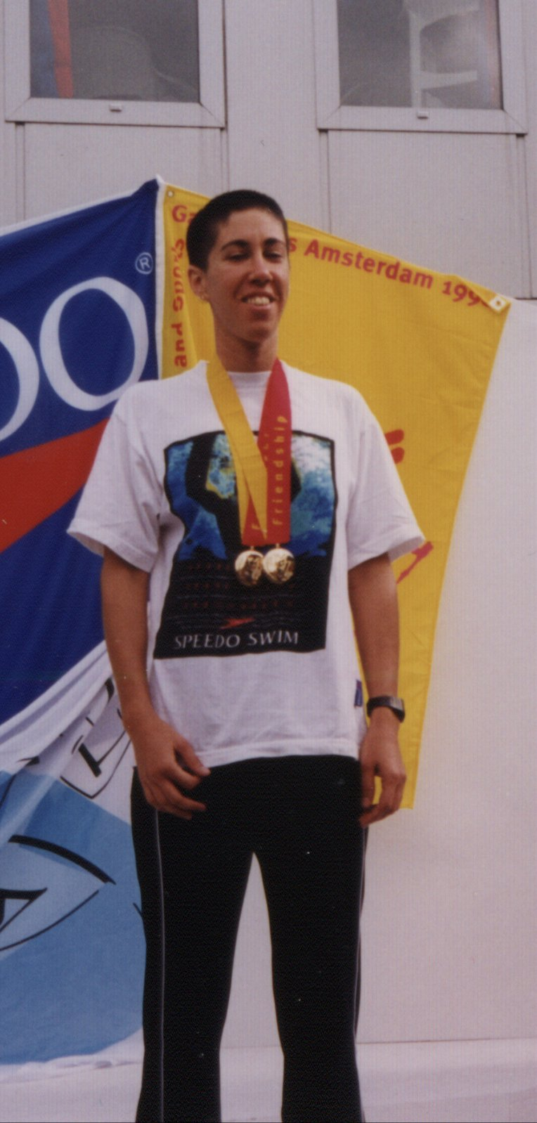 הדס סנדלר על הפודיום, המשחקים הגאים 1998